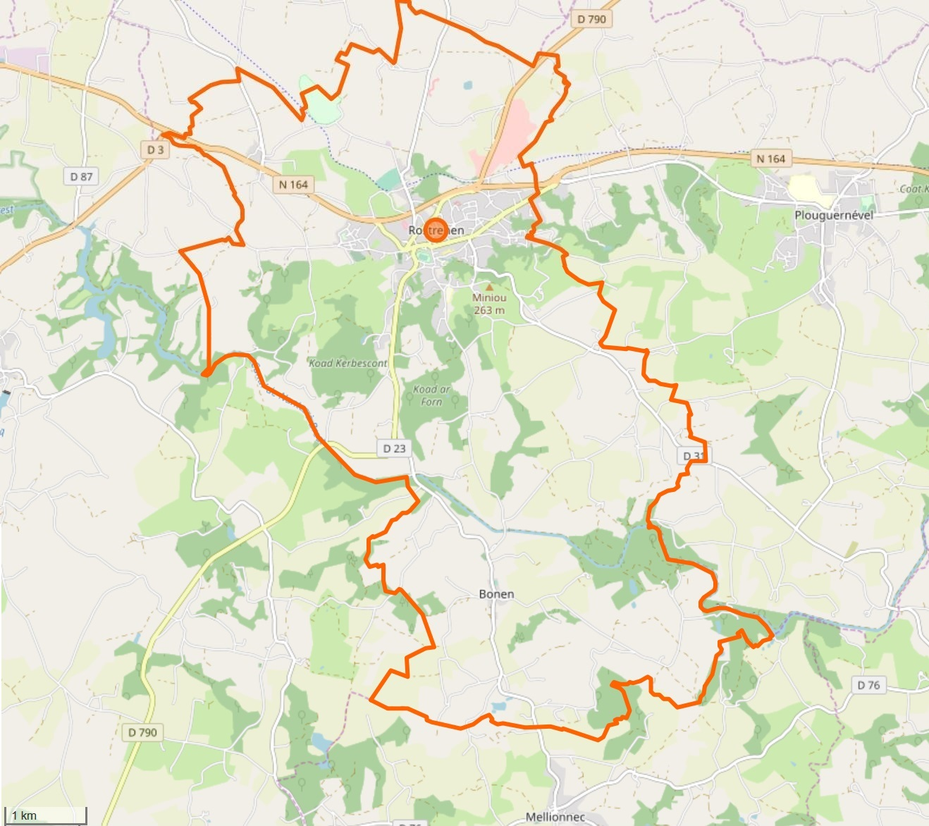 Cette carte a été créée à partir des données du projet openstreetmap. This map may be incomplete, and may contain errors. Don't rely solely on it for navigation.